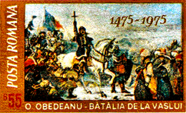 Schlacht von Vaslui 1475 (Briefmarke, Bild zugeschnitten)